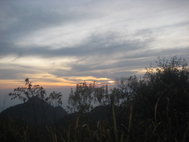 morning in songolikur peak